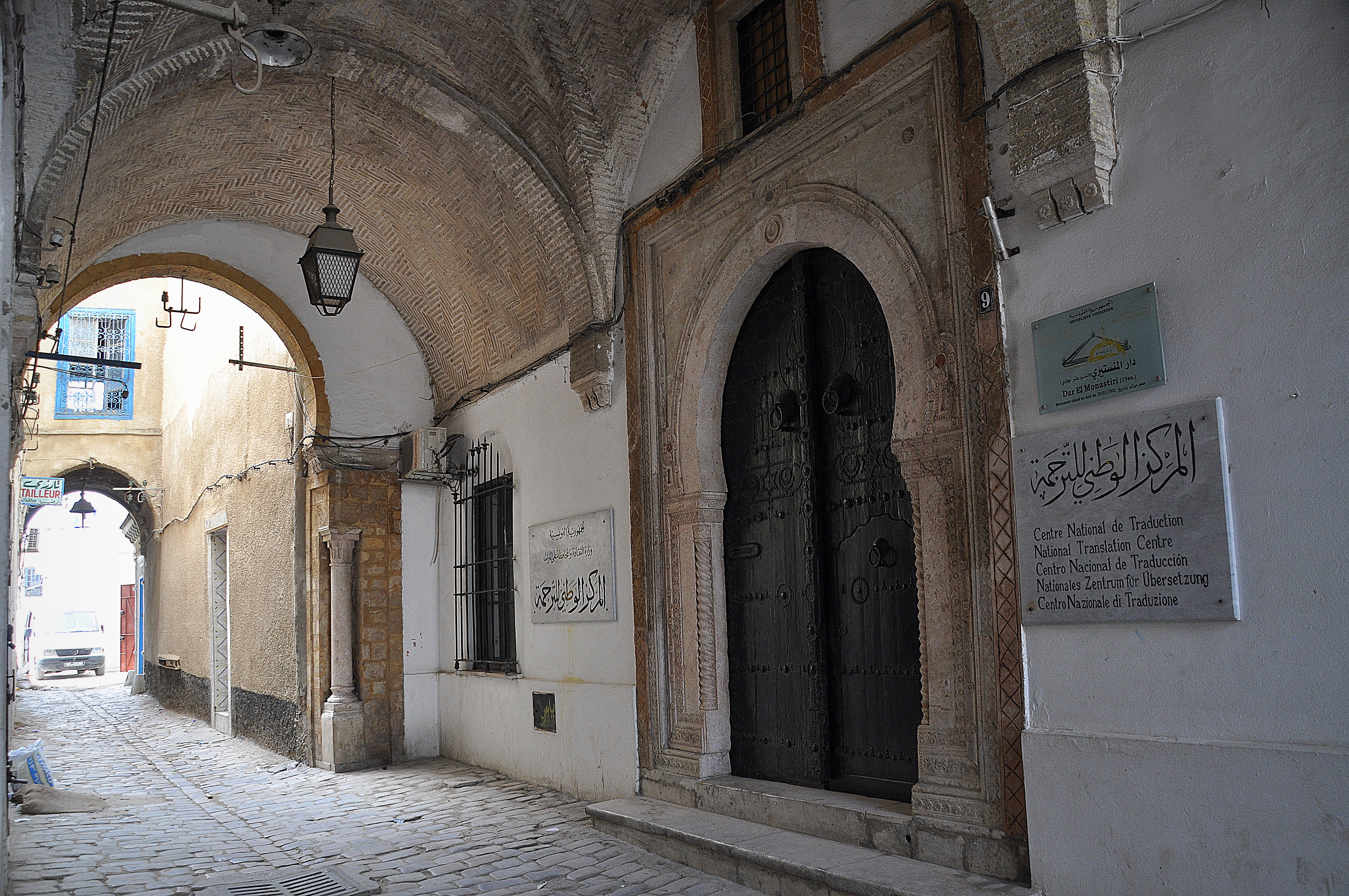 Maison arabe, Tunis